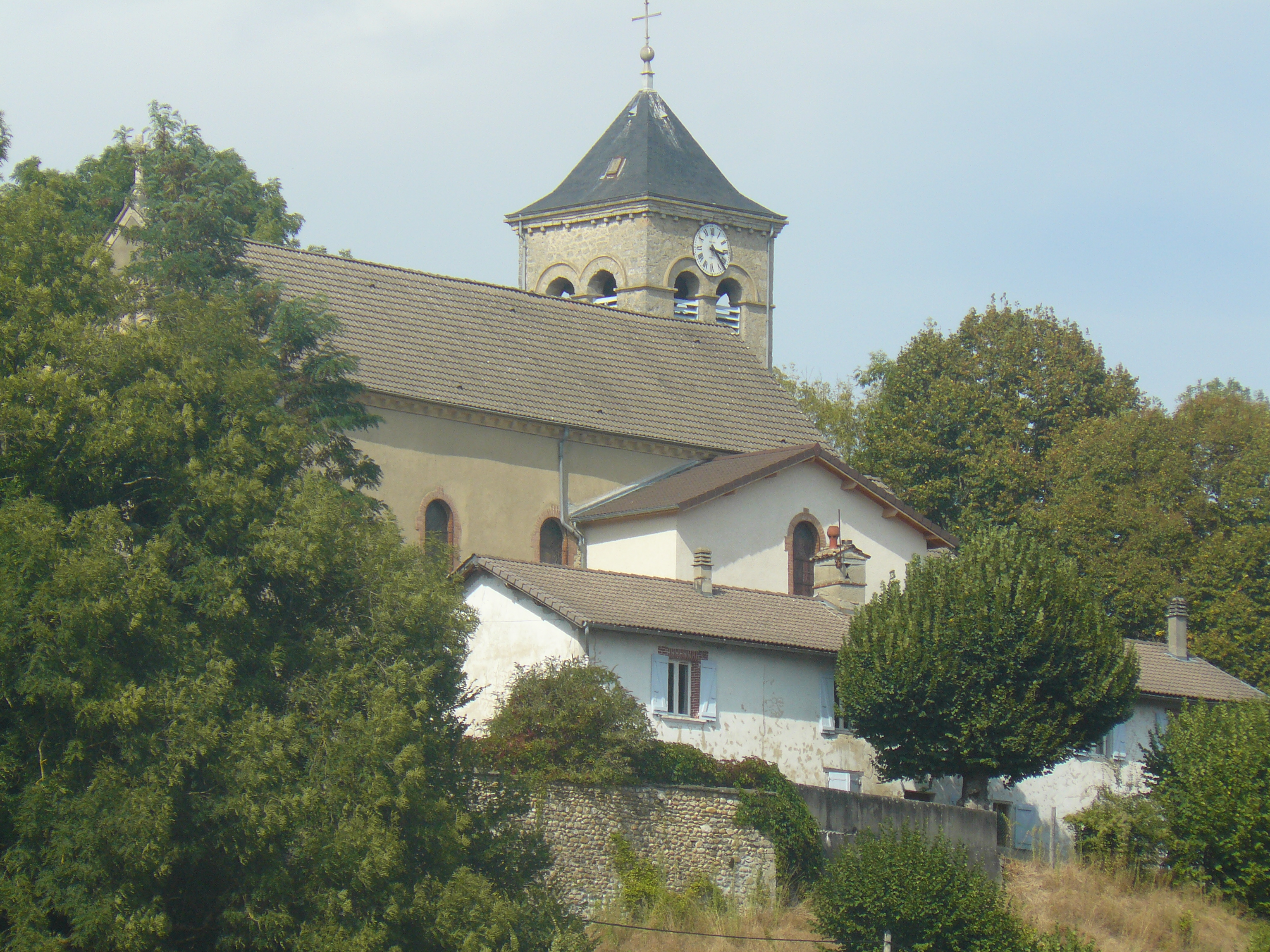 L'église de Saint Michel de PALADRU